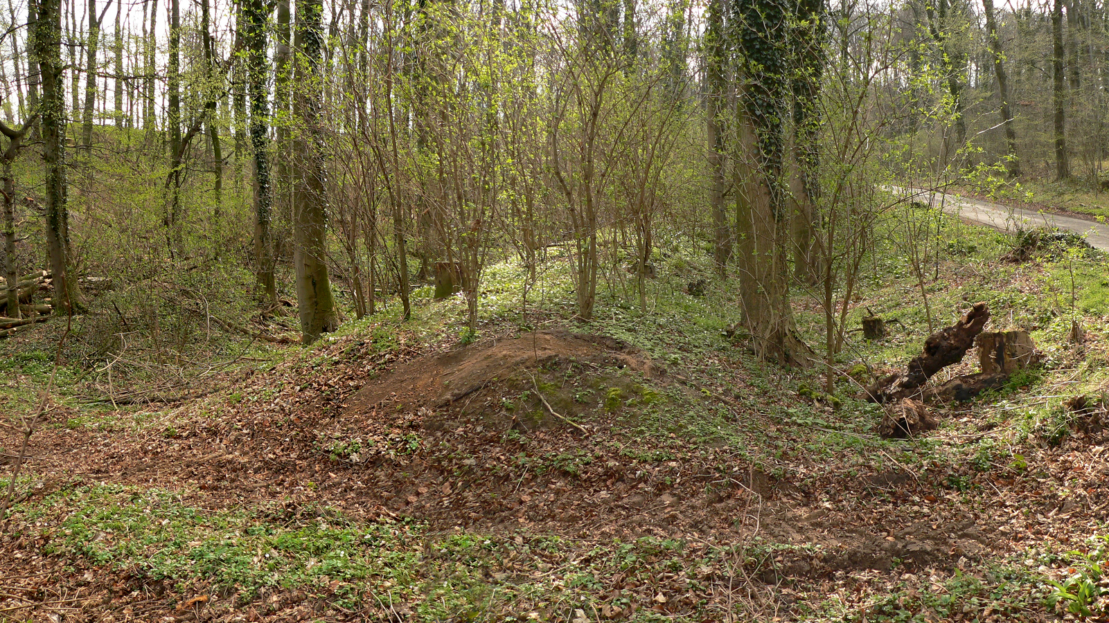 Bückethaler Landwehr am Fuße des Deisters, Wall durchschnitten von Forstfahrzeugen